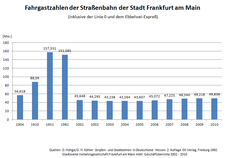 Geografische Darstellung der Fahrgastzahlen der Straßenbahn Frankfurt am Main (inklusive der Linie 0 und dem Ebbelwei-Expreß) der Jahre 1904, 1910, 1951 und 1981 sowie 2001 bis 2010